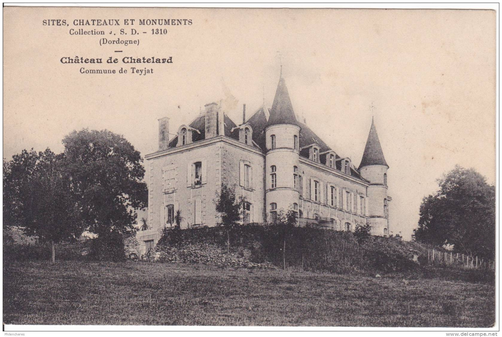 Chateau du Chatelard (Teyjat-Dordogne)